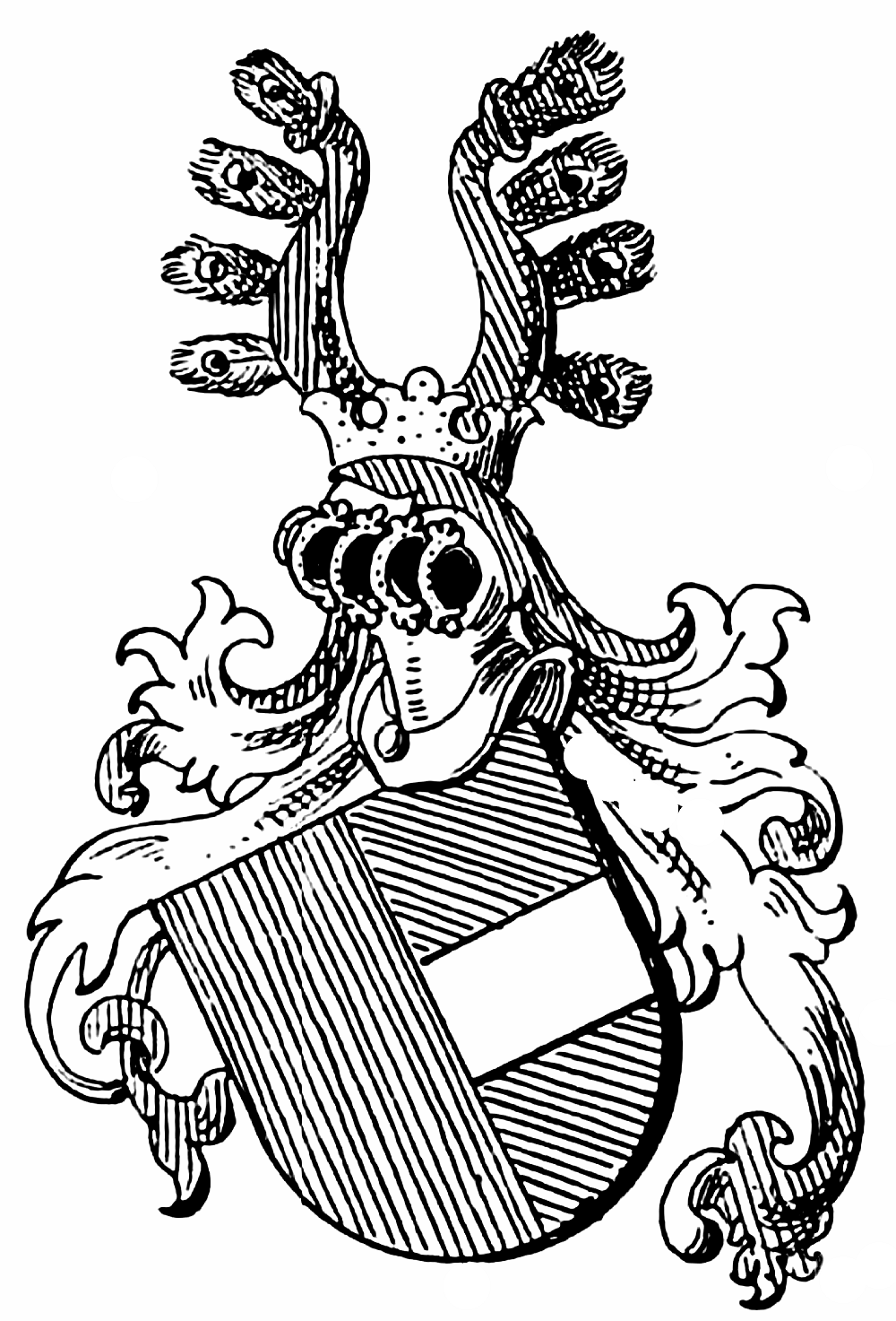 Idunspeugen (Jedenspeigen), nach Siebmacher